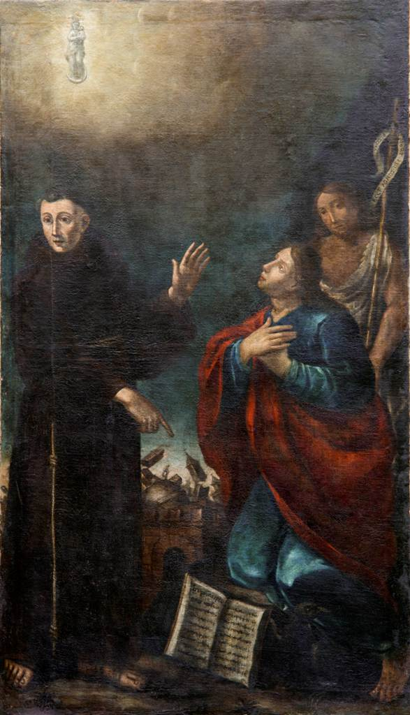 Giovanni Battista Tinti, San Francesco Solano indica un terremoto accanto ai santi Giovanni Evangelista e Giovanni Battista (Pinacoteca comunale di Cento)